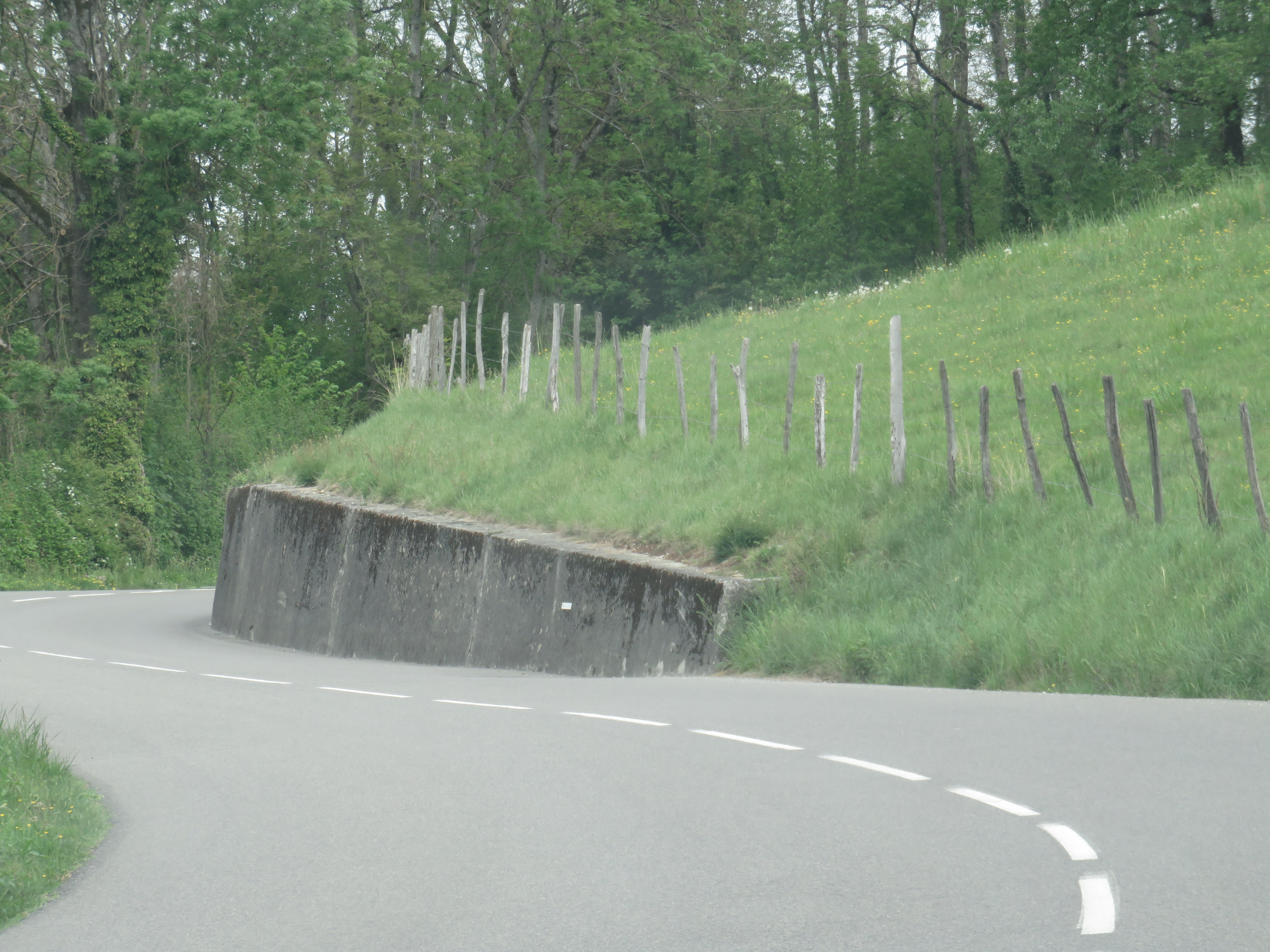 Un mur de soutènement (Marcellaz-Albanais, France) le 21 avril 2020.